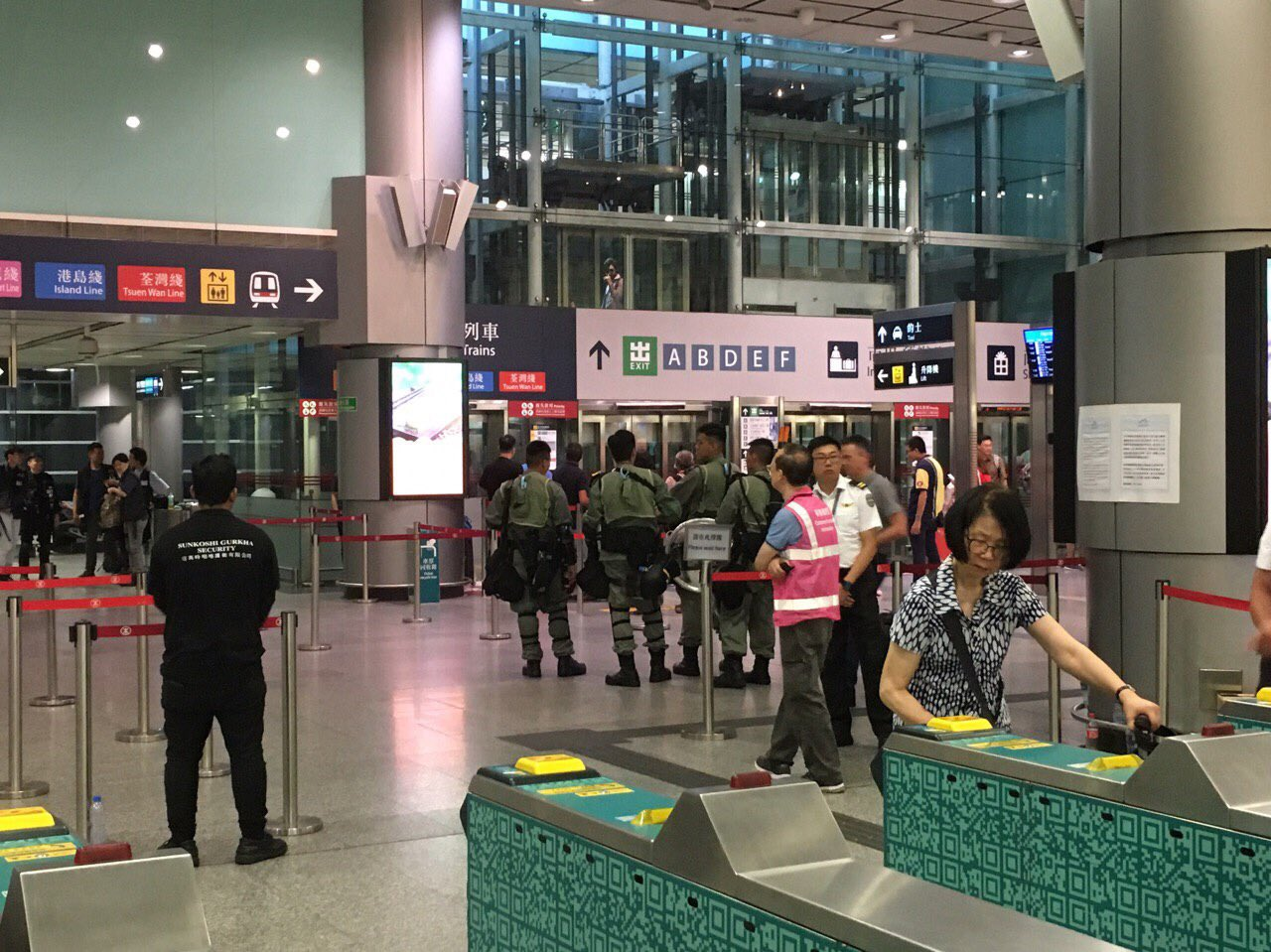 在起始的“香港站”内，中午时分已有多名防暴警员佈防